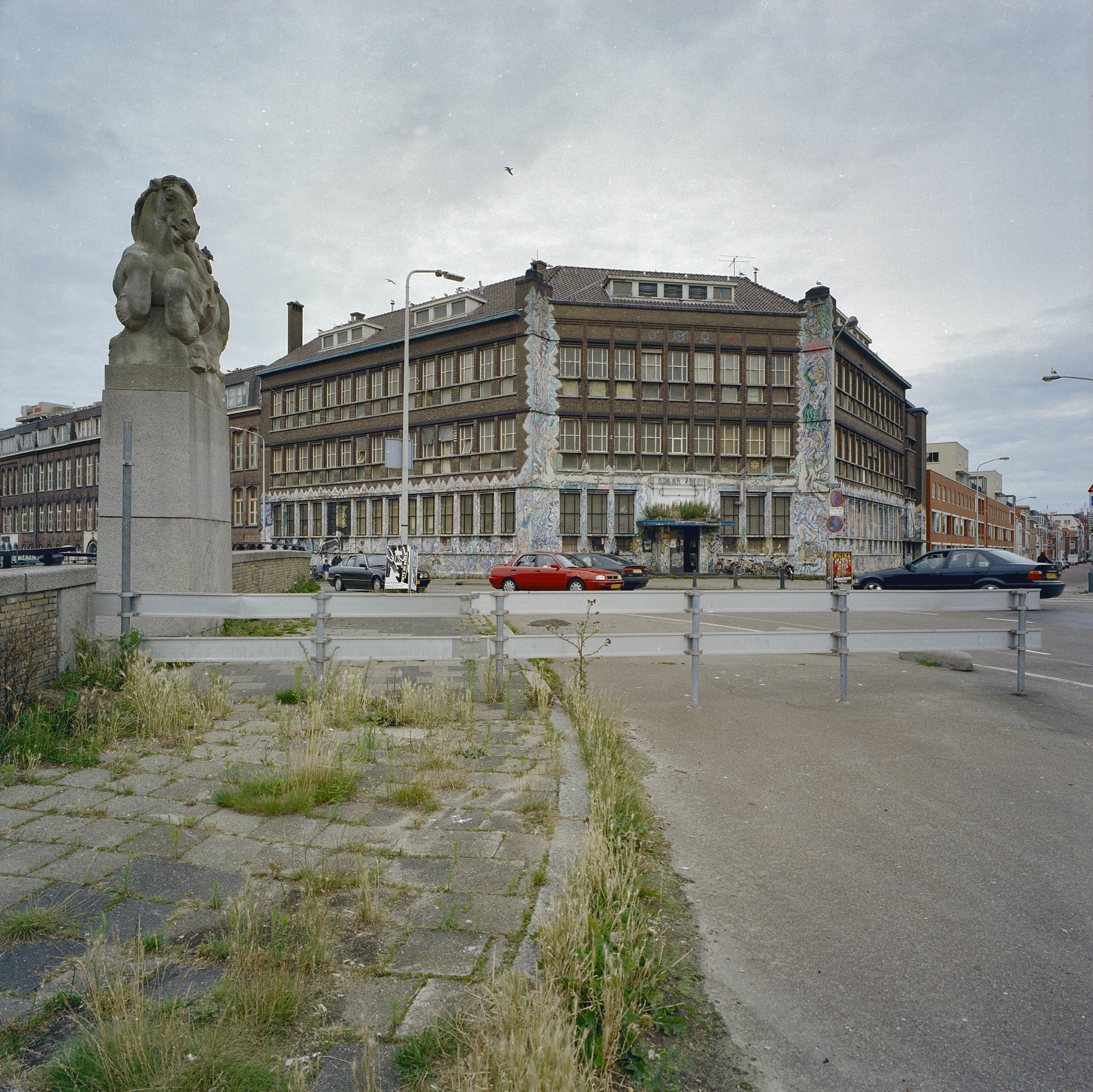 Exterieur, overzicht en ligging gebouw